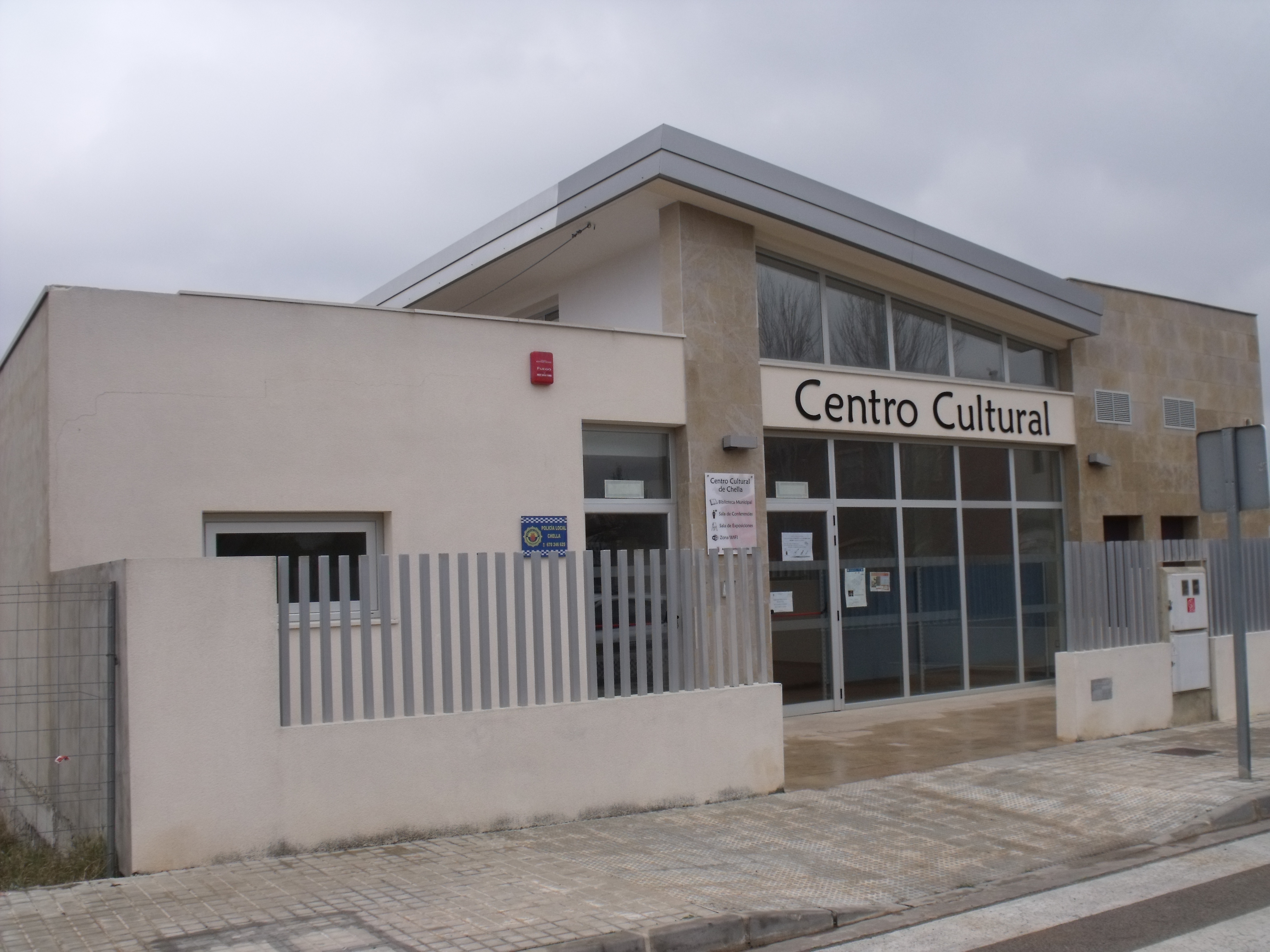 Centro Cultural y Policía Local